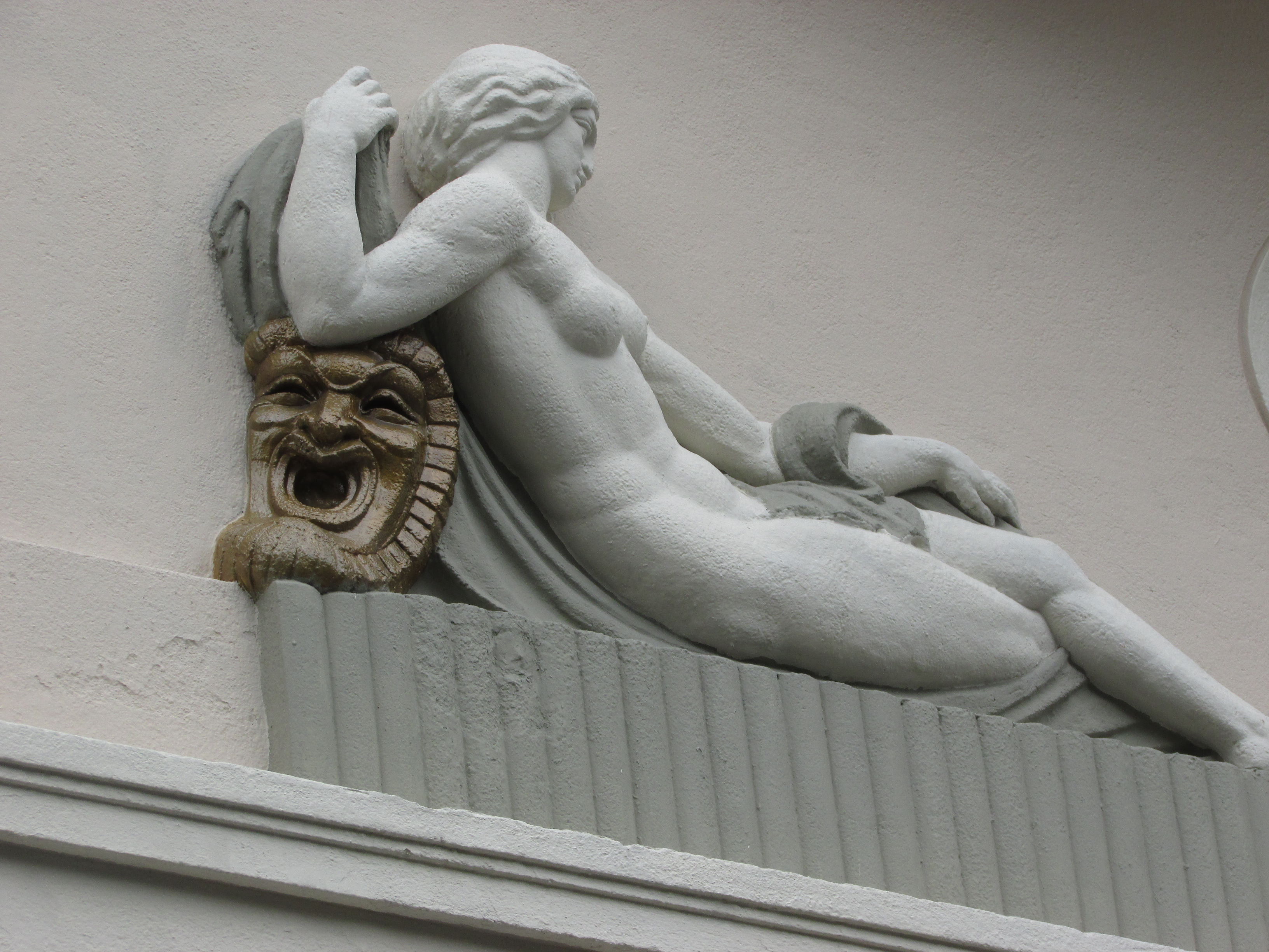 Detalhe da edificação : Máscara da Comédia no teatro